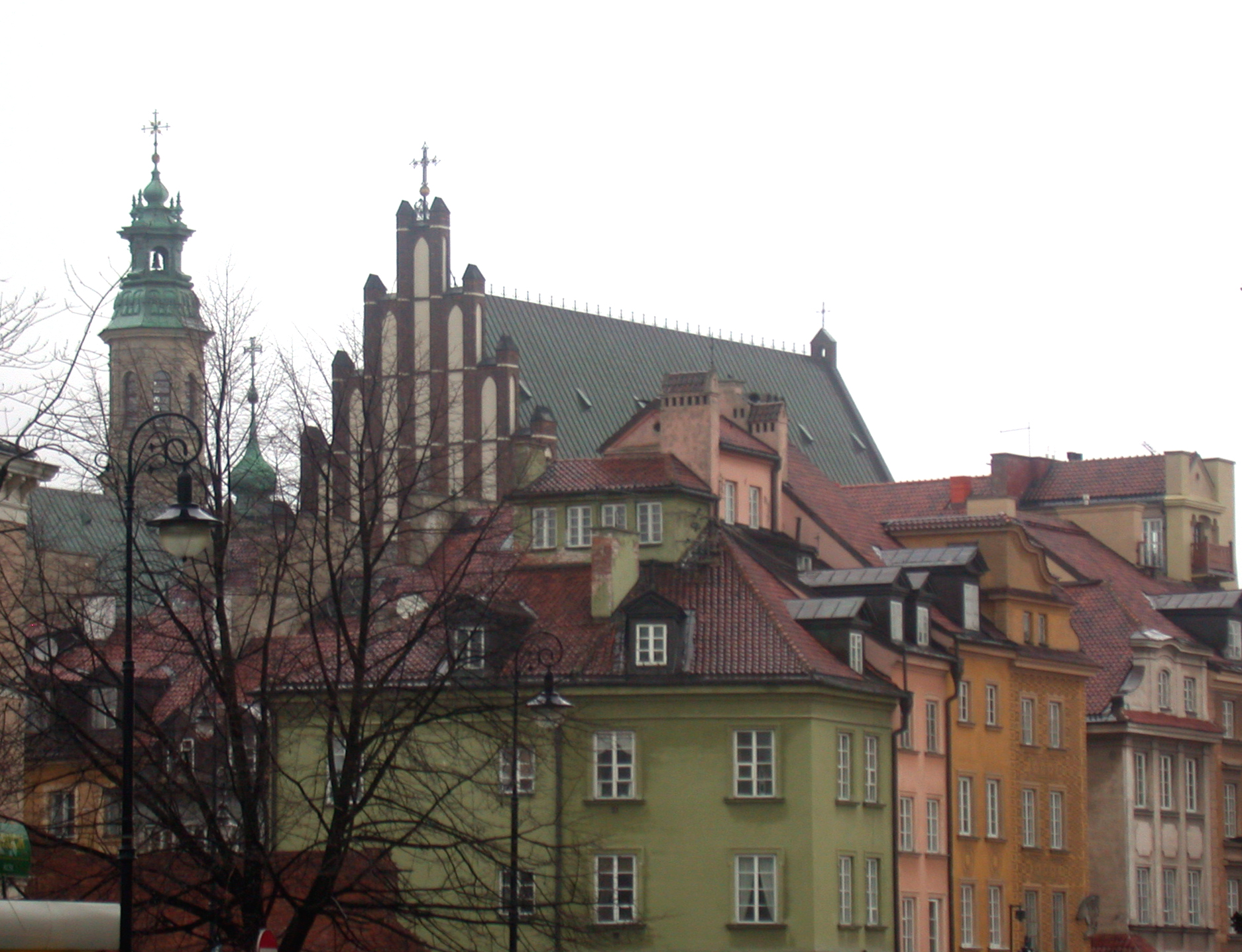 Varsavia, cattedrale di San Giovanni (katedra Św. Jana) dalla piazza del Castello Reale (plac Zamkowy).